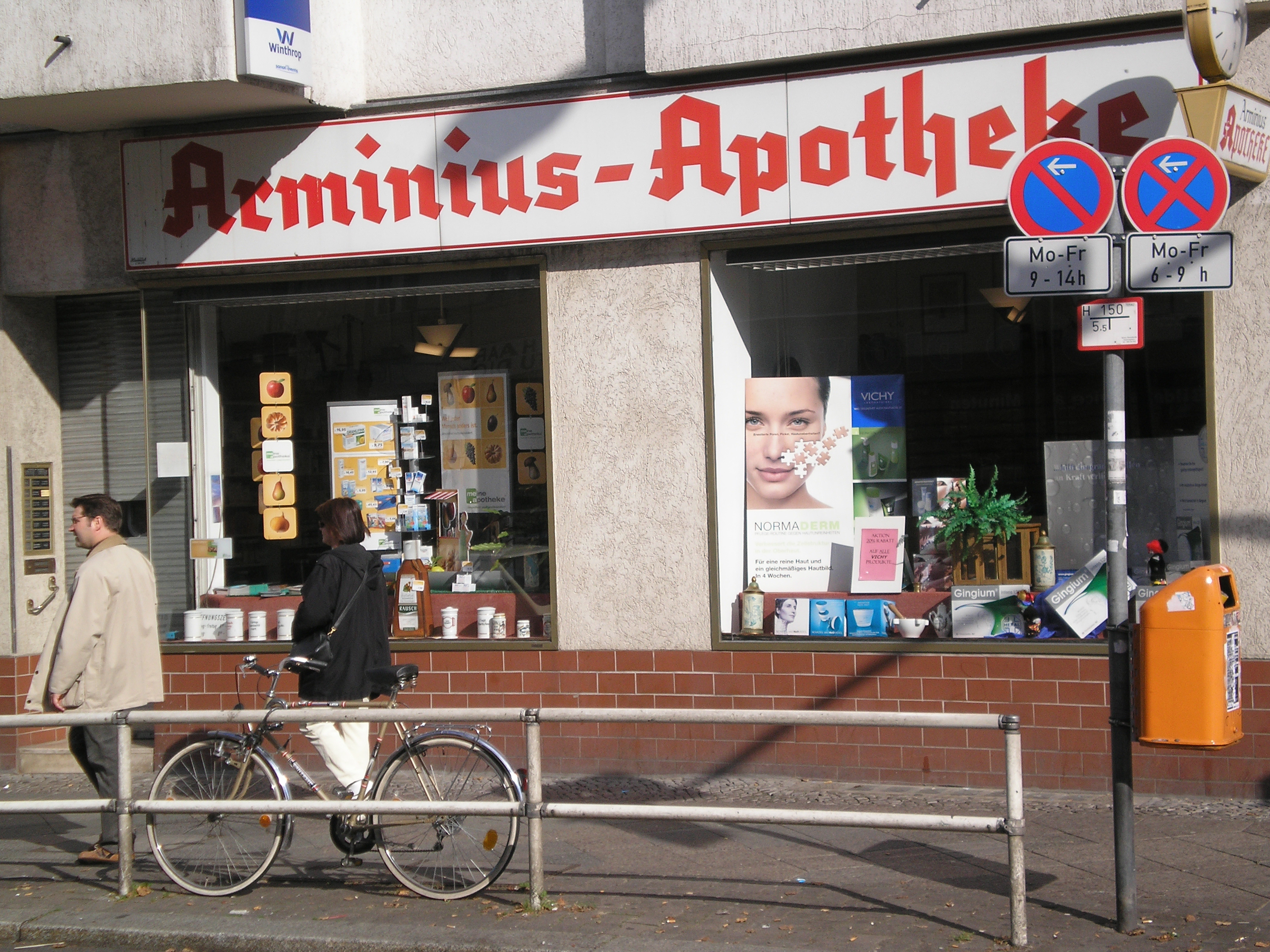 pharmacy in Berlin-Neukölln in Hermannstraße (Berlin-Neukölln)